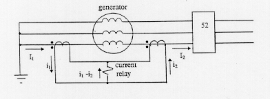 Фигура 1: Диференциална защита на генератор.